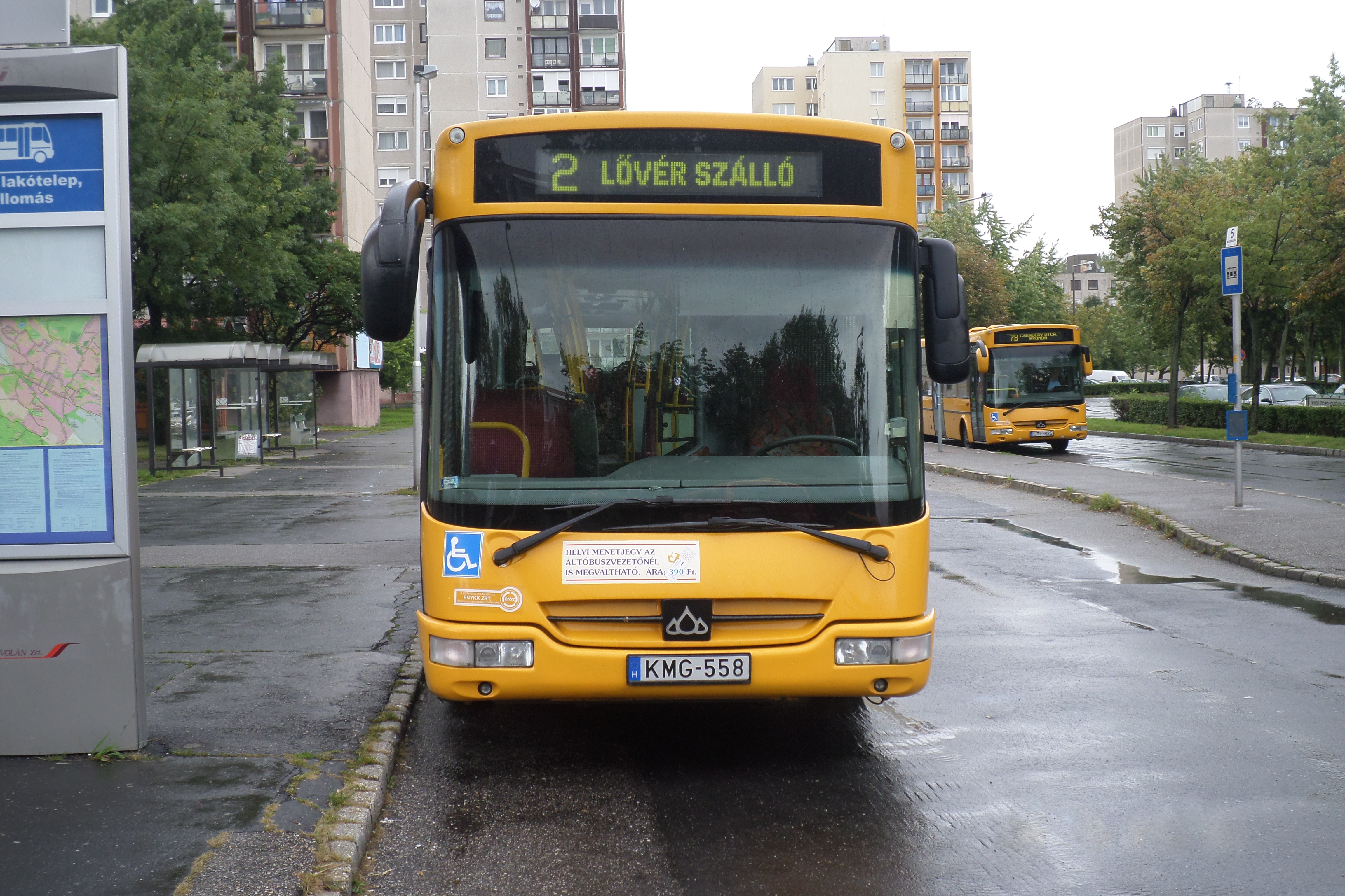 A kép a soproni 2-es jelzésű autóbusz ábrázolja a Jereván lakótelepi végállomásán.